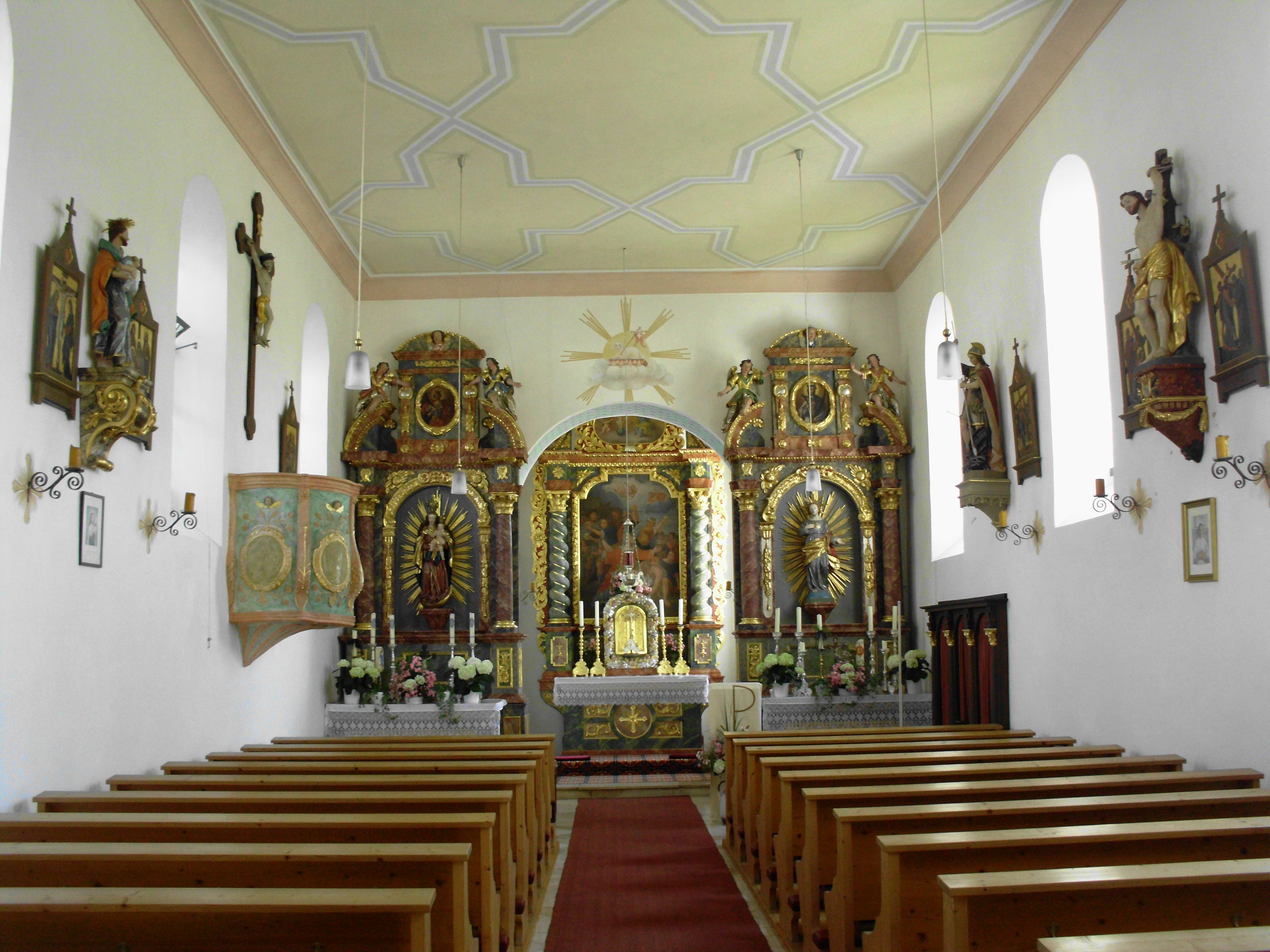 Unterdolling, Filialkirche St. Stephan, Kircheninneres